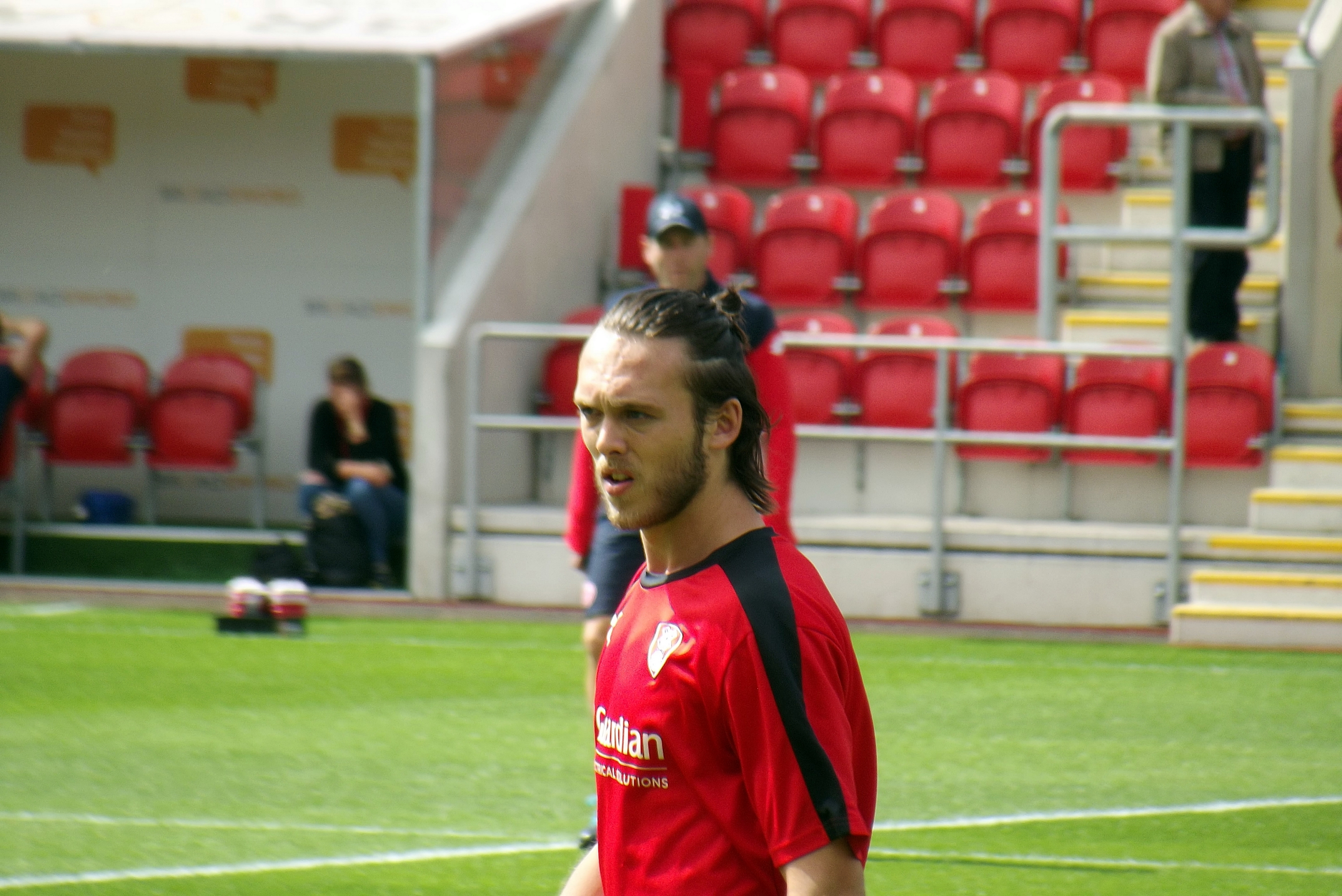 Rotherham Utd v Fsv Mainz 05 (33)